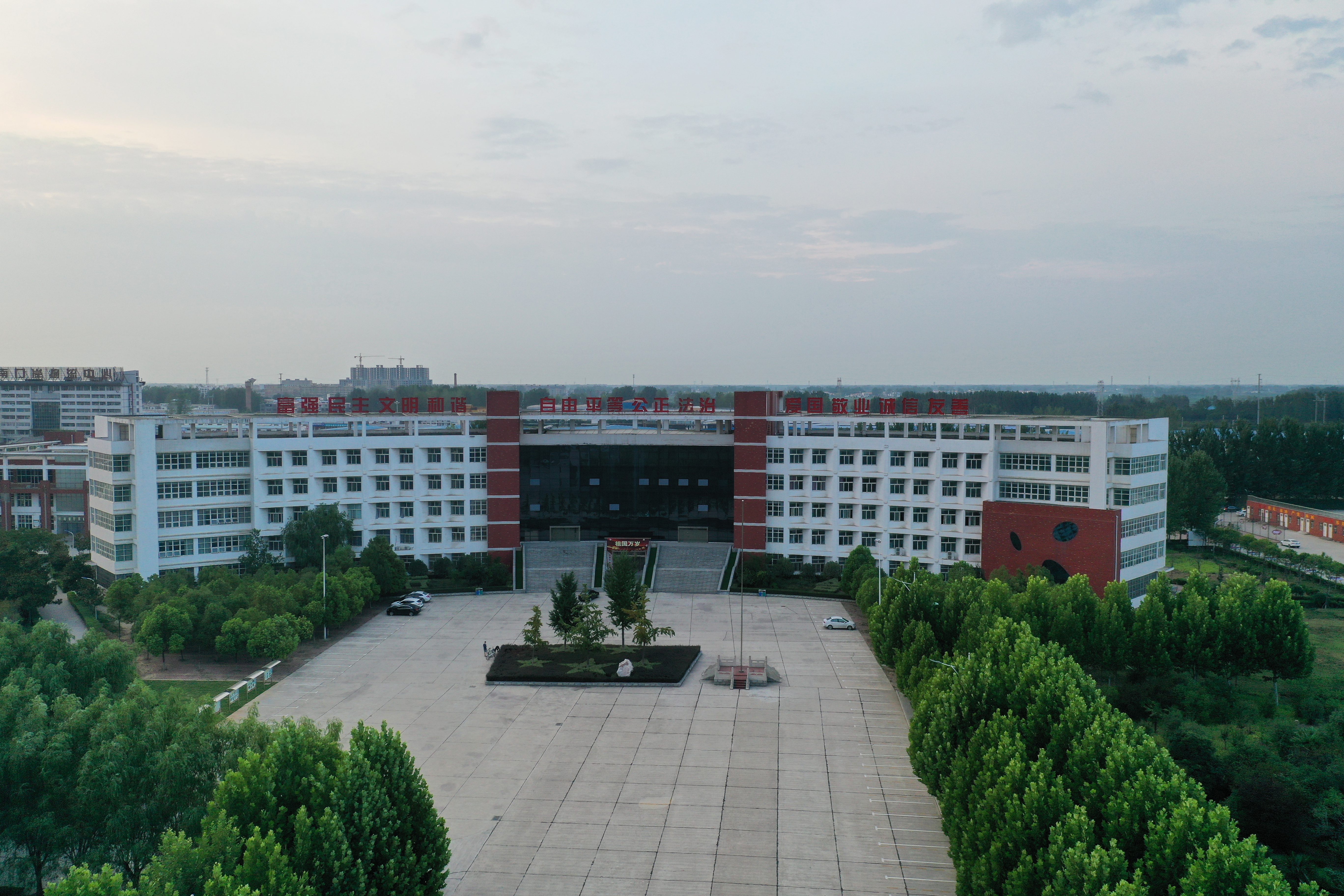 中文（中国大陆）: 漯河市高级中学北校区升旗广场与艺术楼航拍